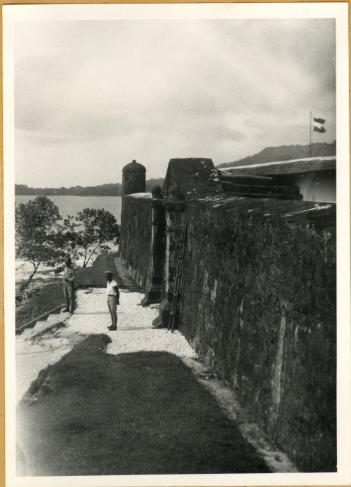 Negatief. Ingang van fort Duurstede te Saparoea, Molukken